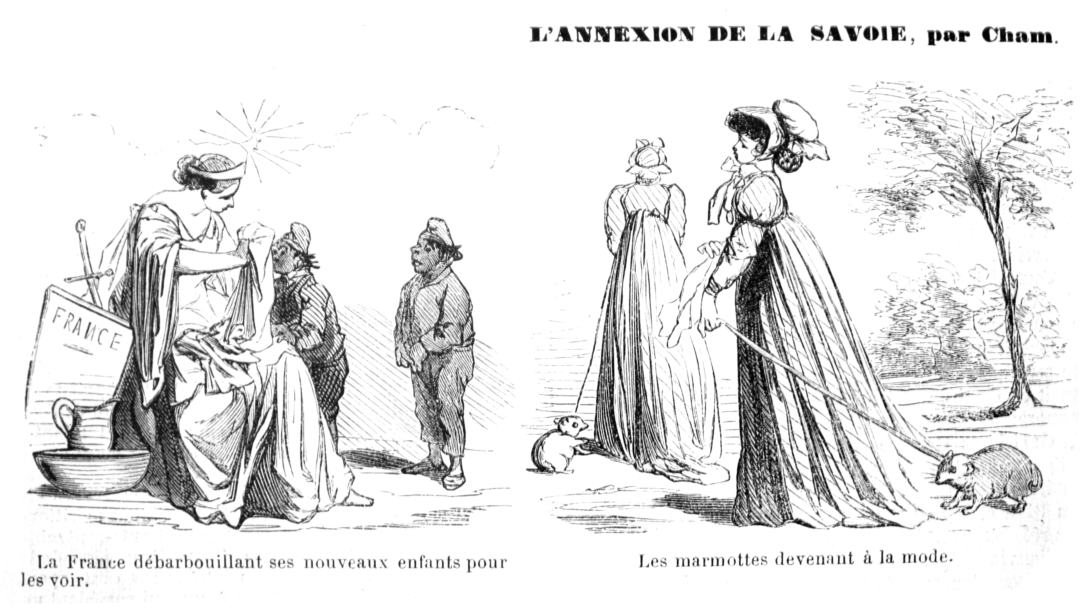 Caricature faisant suite à l'Annexion de la Savoie (1860), dans un journal français.